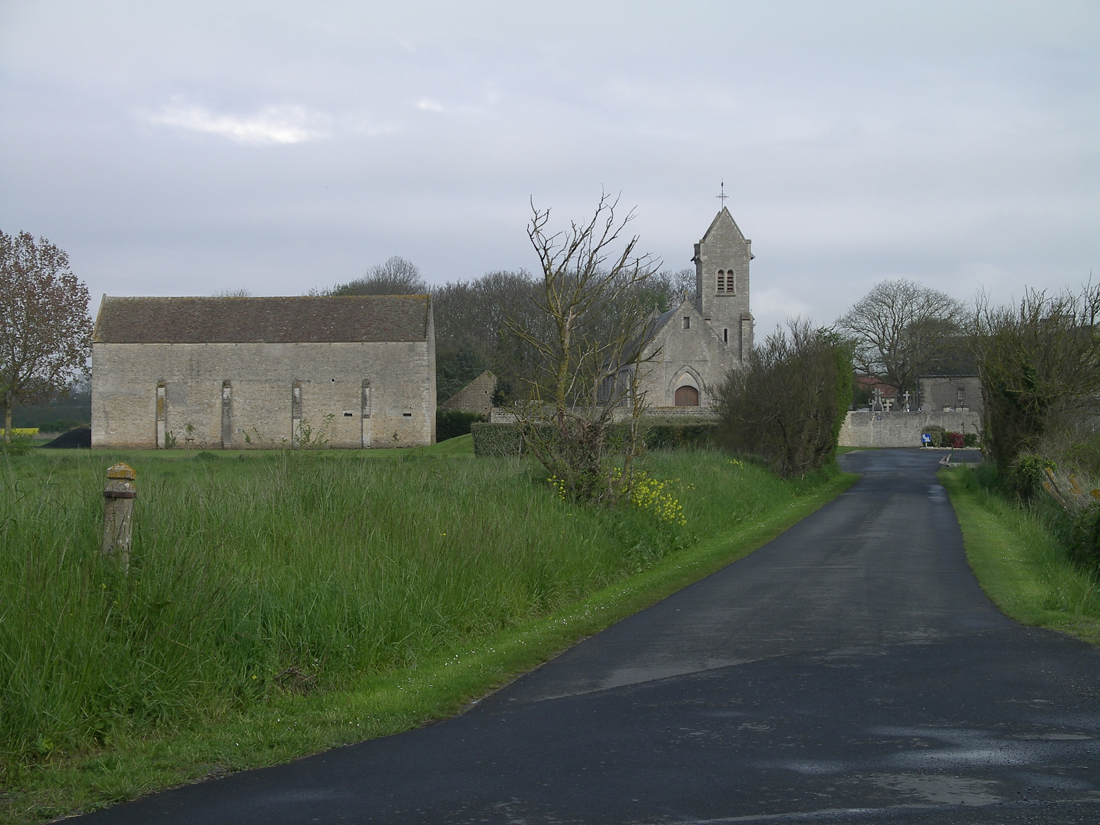 Graye-sur-Mer (Calvados) église Saint-martin et grange aux dîmes